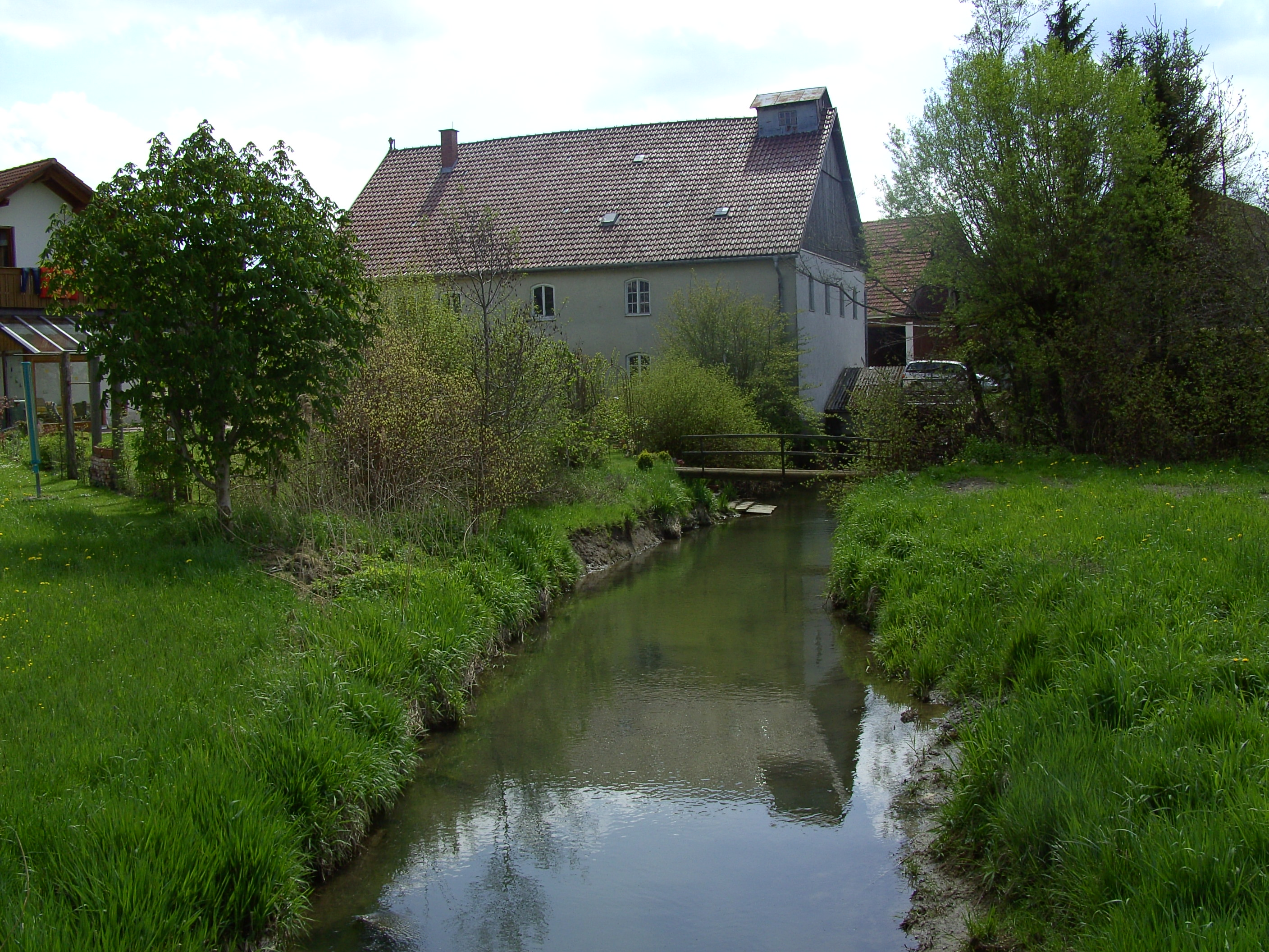 Die Ecknach bei Sielenbach